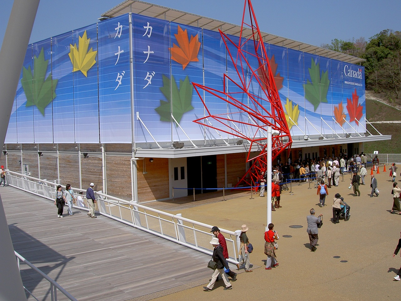 EXPO2005 CANADA pavilion